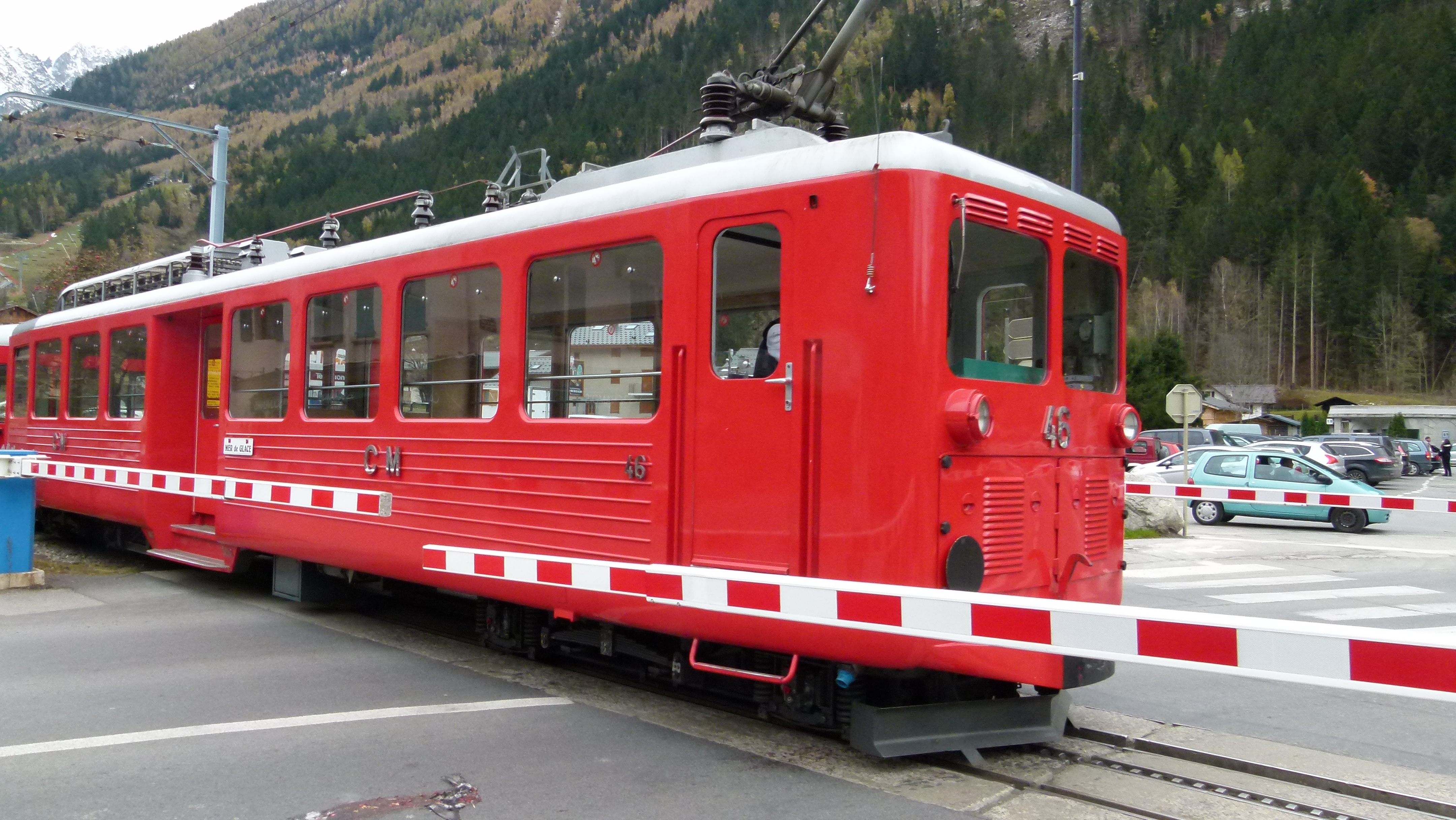 Chemin de fer du Montenvers, Chamonix 1